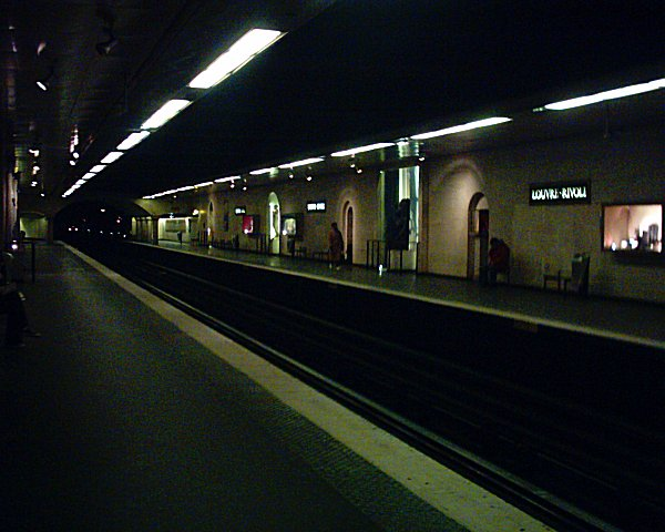 Station du Louvre du Métropolitain de Paris.